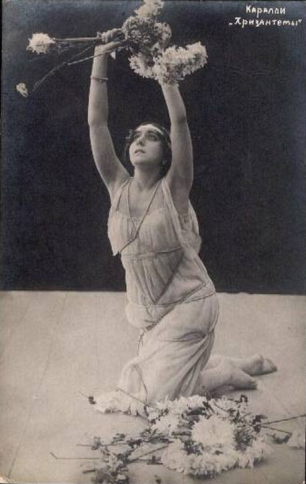 Вера Каралли